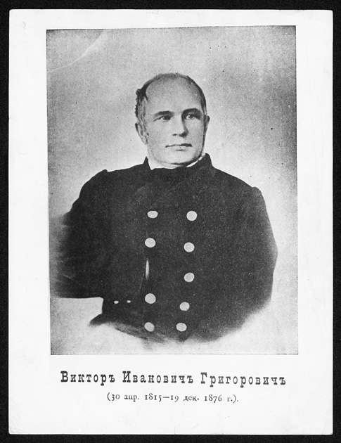 Виктор Иванович Григорович